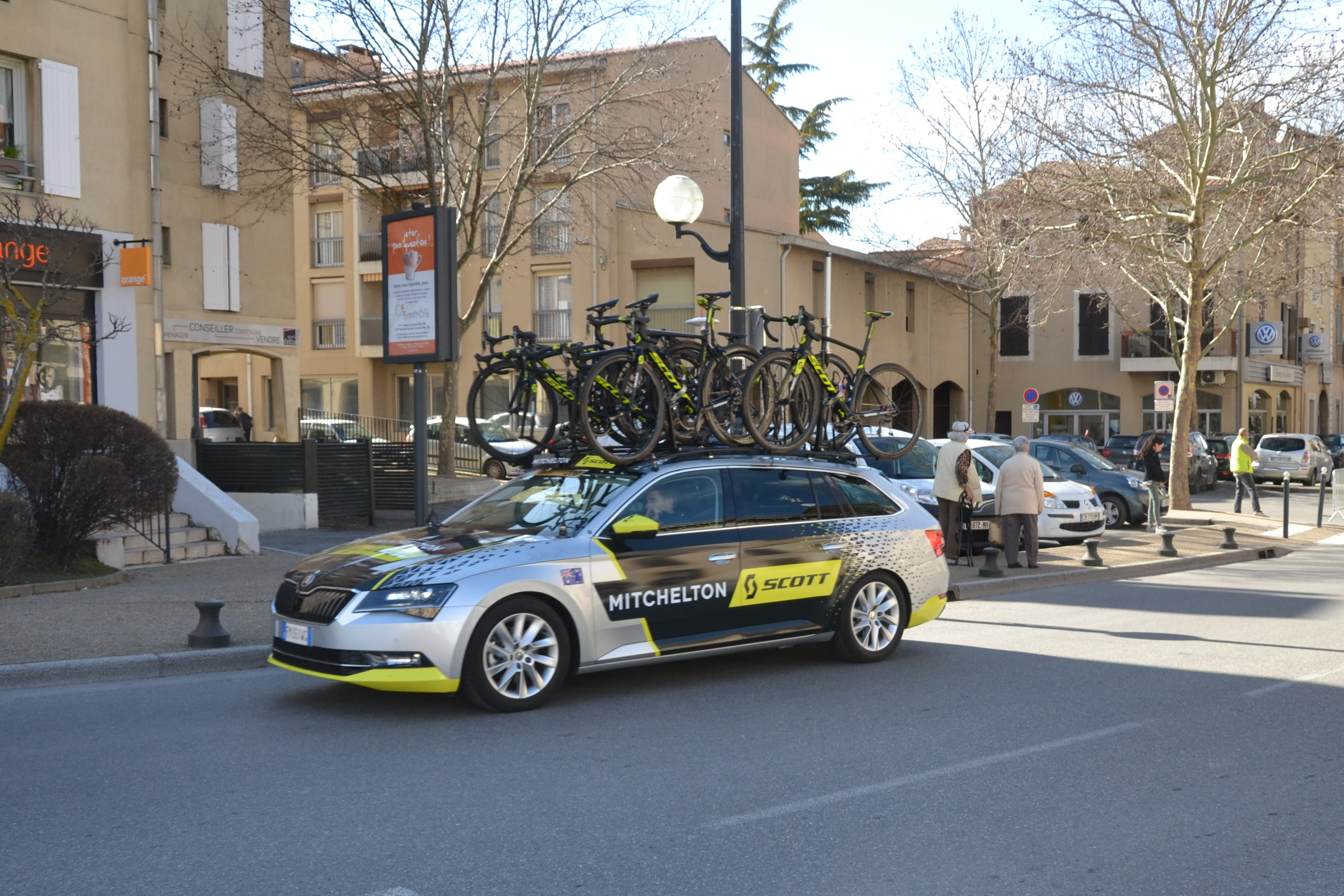 lors de la 5ème étape du Paris-Nice 2018, à Apt